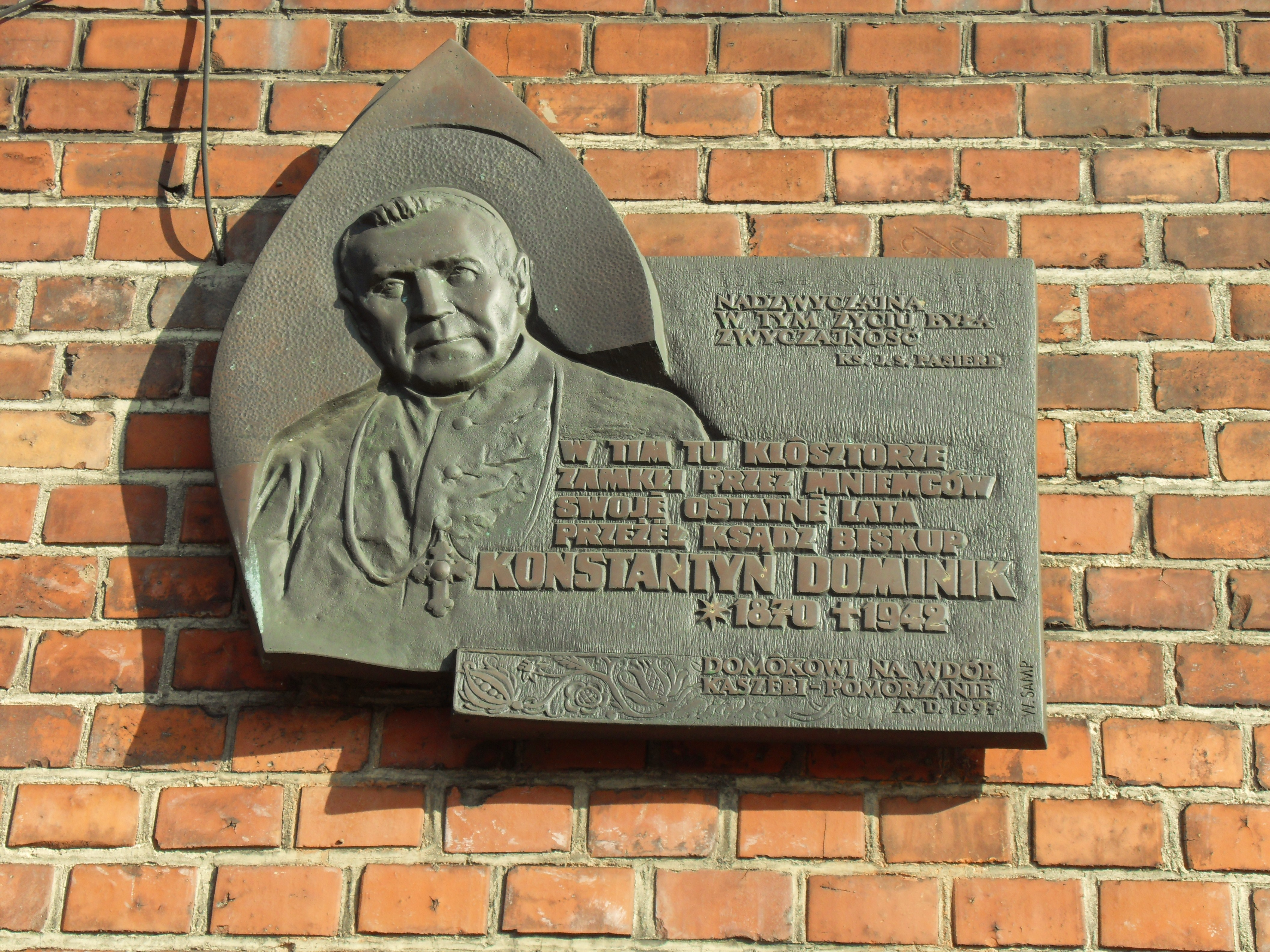 Gdańsk Śródmieście. Targ Sienny 5, przedszkole elżbietanek, tablica poświęcona biskupowi Dominikowi.